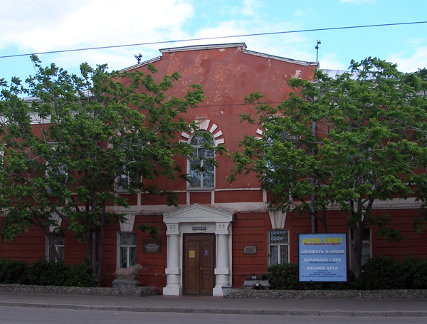 Алтайский краеведческий музей, основан в 1823 году Фасад